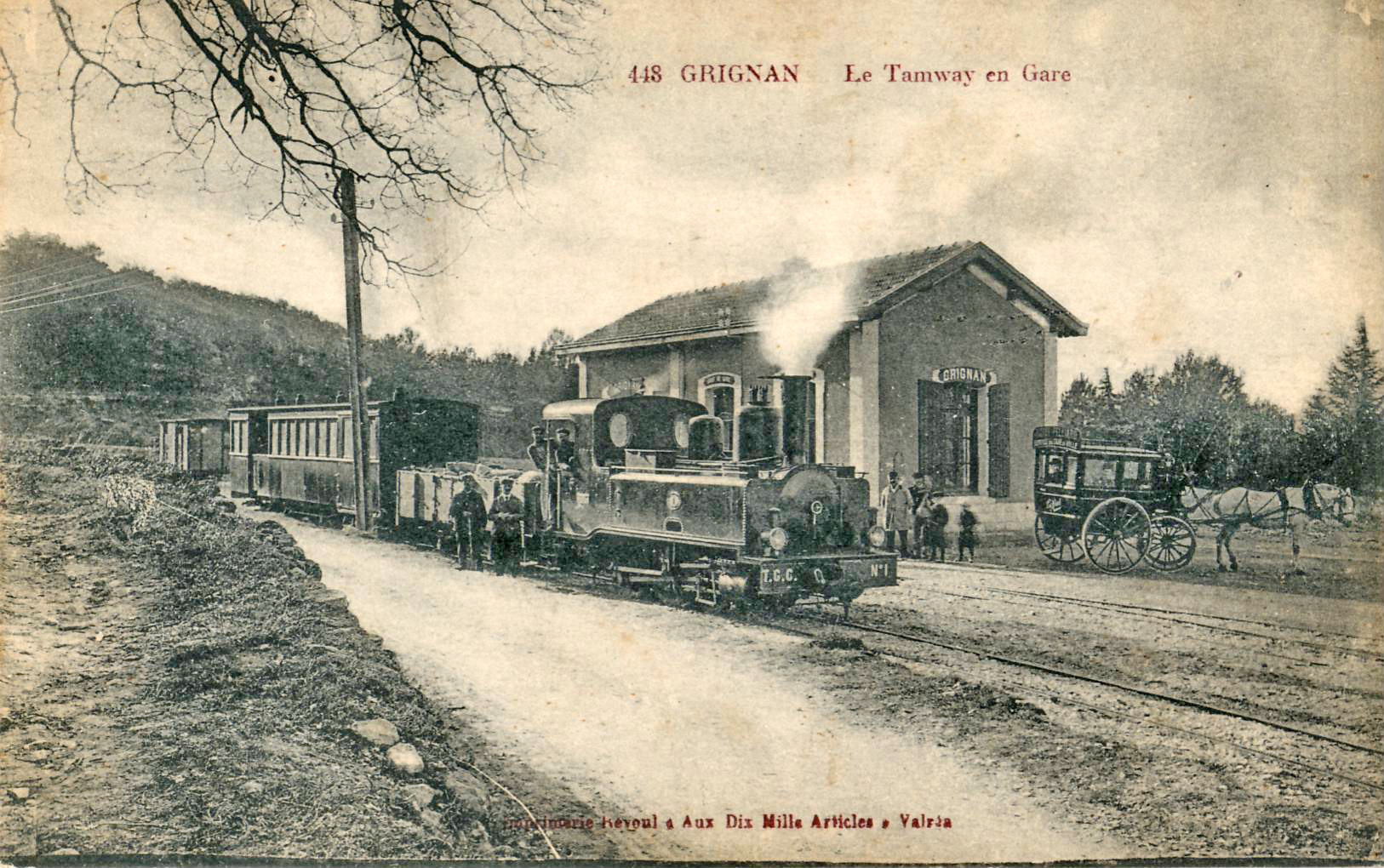 Carte postale ancienne éditée par Imprimerie Révoul "Aux dix mille articles" Valréa, n°448 : GRIGNAN - Le Tramway en Gare(Chemin de fer Taulignan-Grignan-Chamaret)